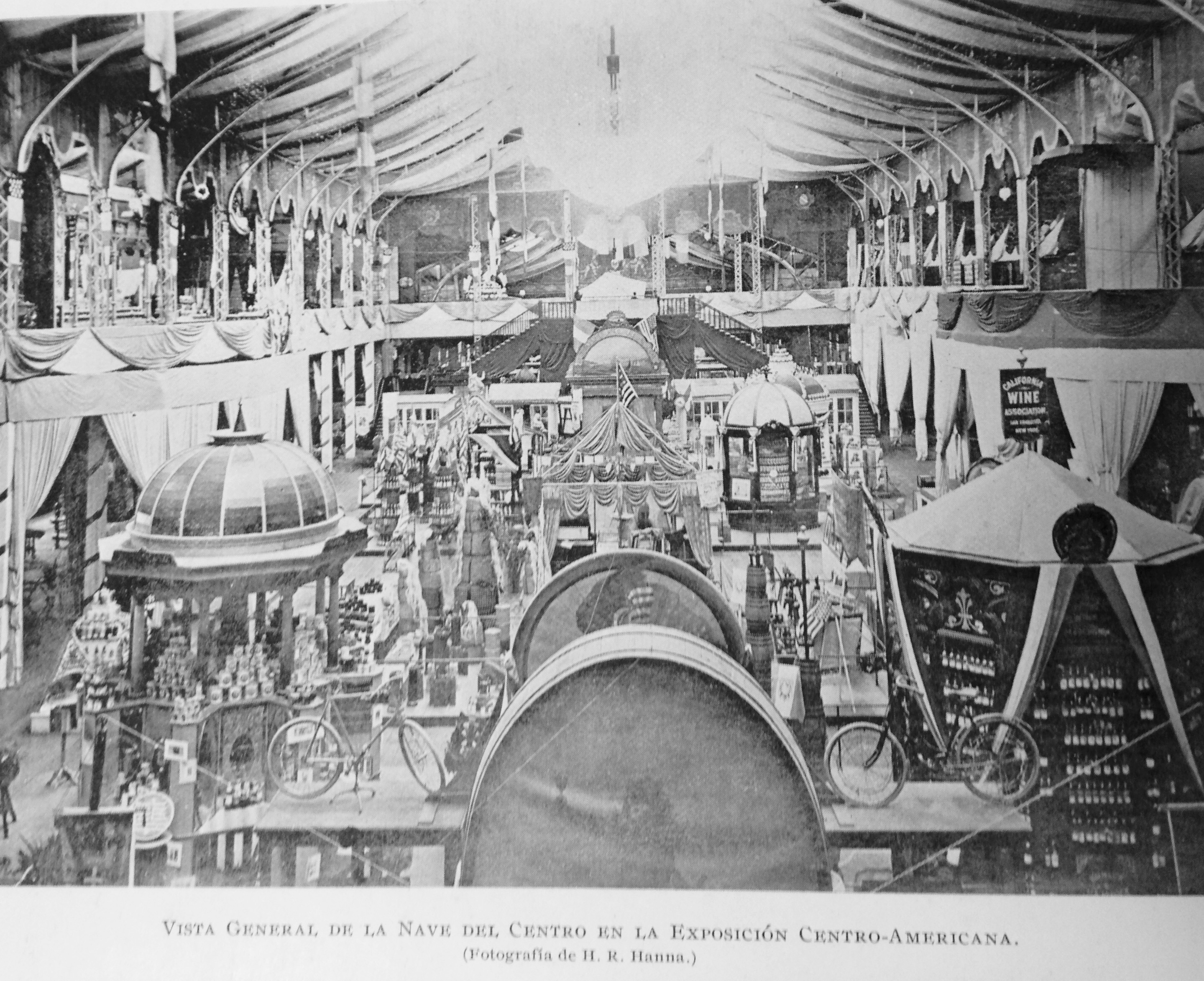 Exposición Centroamericana de 1897 en Guatemala. Gobierno del general José María Reina Barrios.